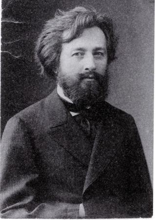 Ludomir Benedyktowicz